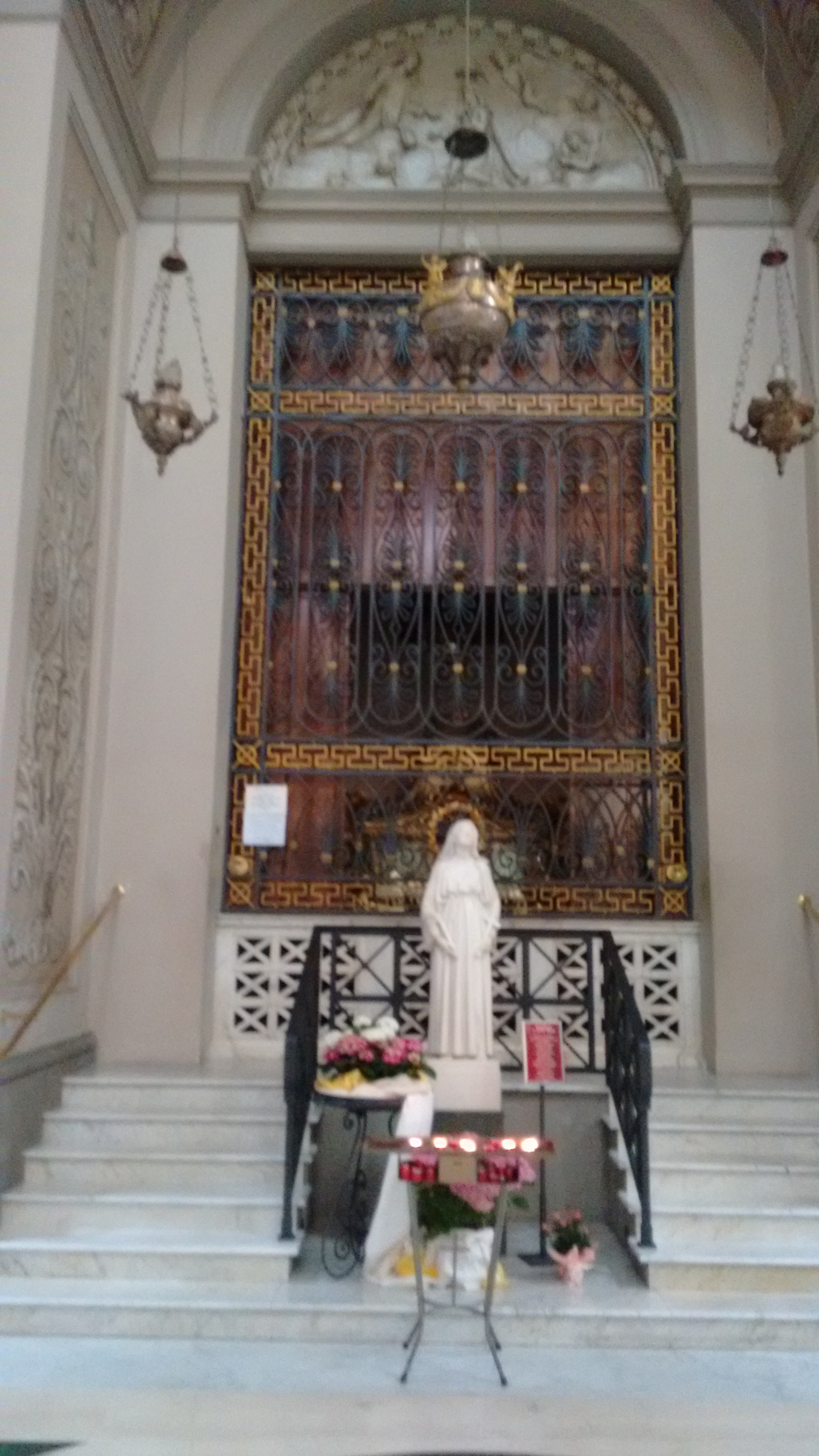 Fotos da Cidade de Viterbo, Itália: Santa Rosa de Viterbo; Monastero Santuario Santa Rosa di Viterbo